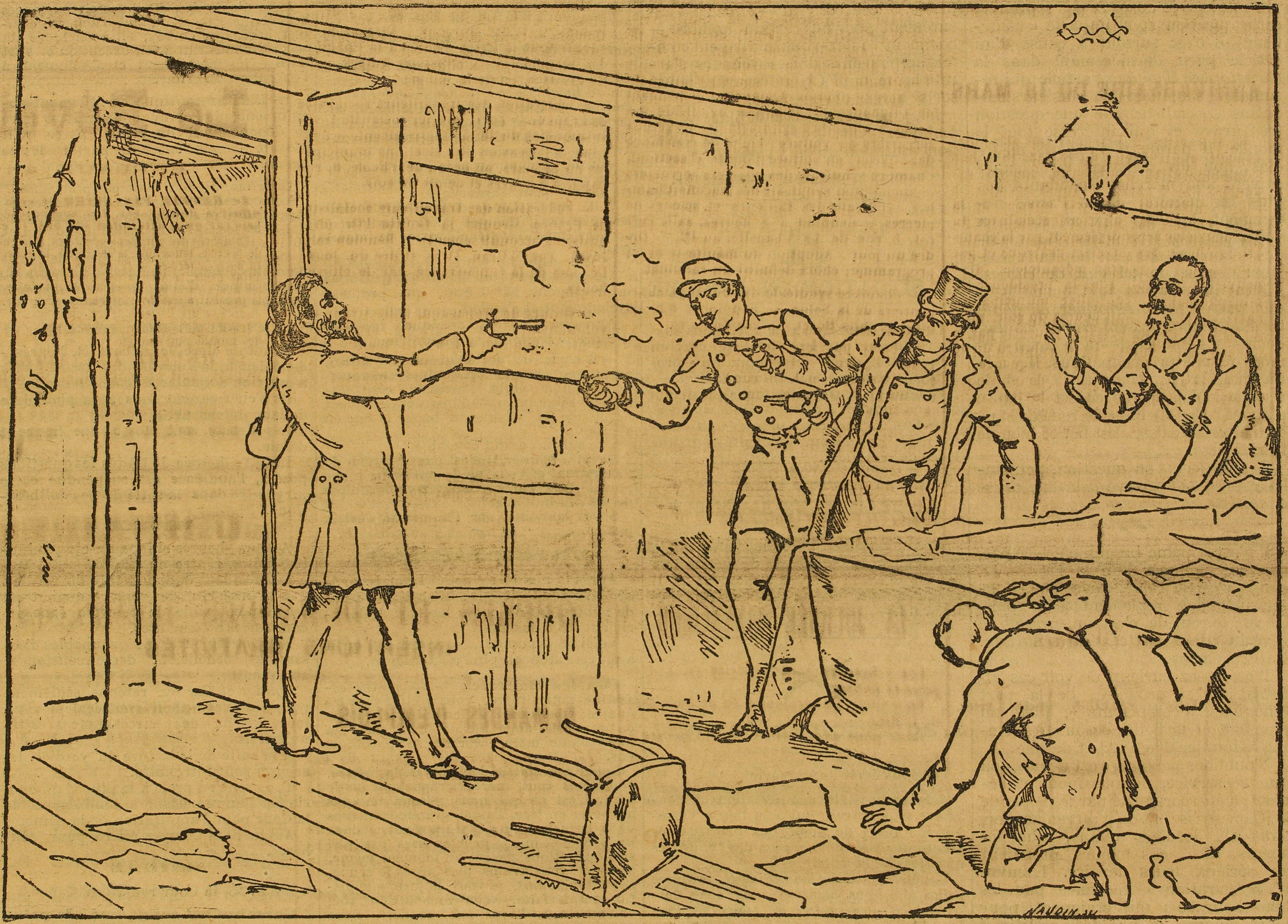 "L'attentat du 7 janvier dans les bureaux du Cri du Peuple, 106, rue de Richelieu".